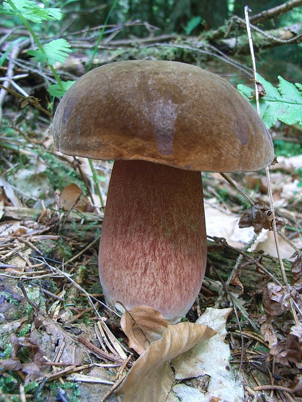 Hexenröhrling